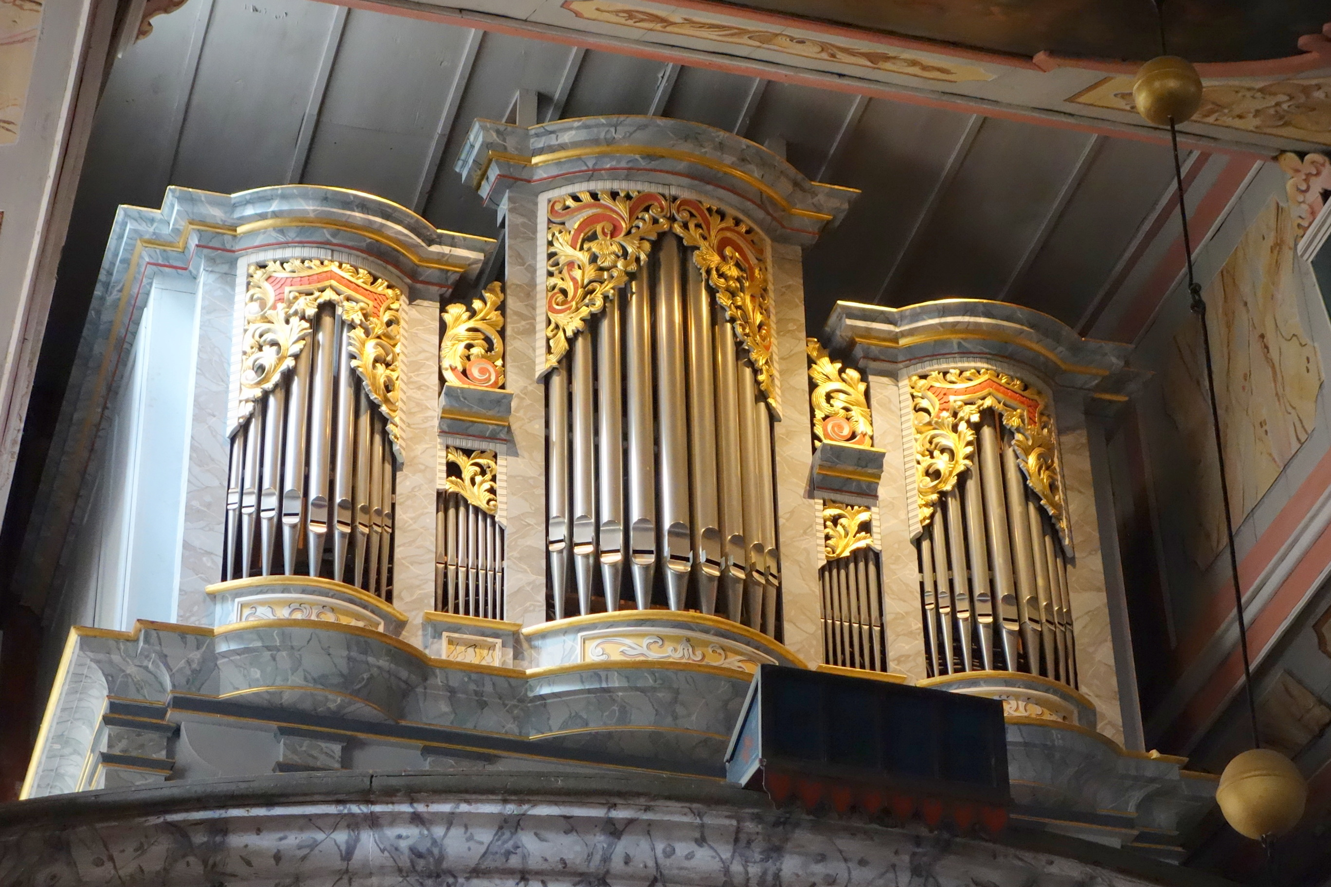 Orgel der Bergkirche Oybin, Sachsen, Deutschland